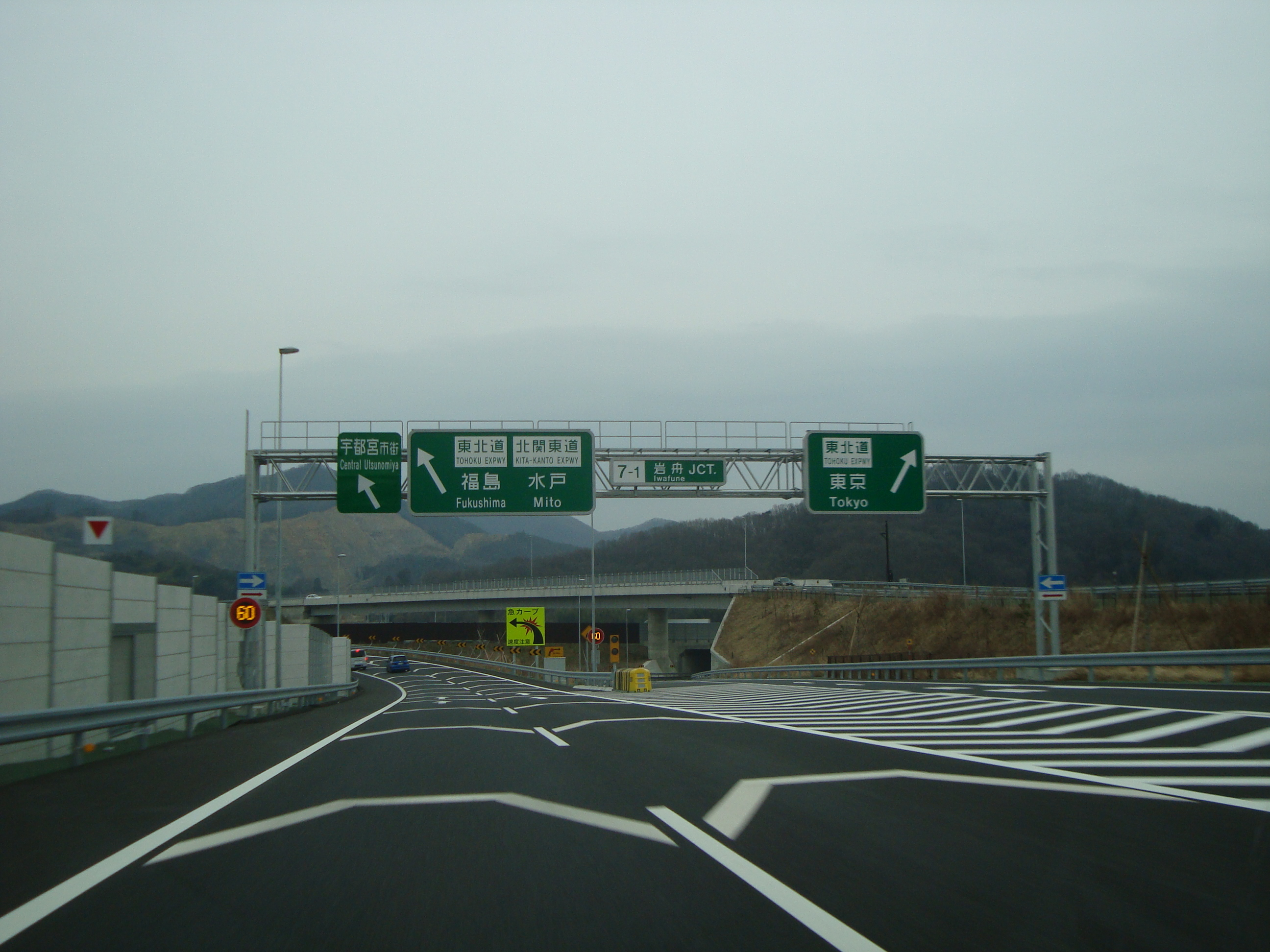 北関東自動車道・東北自動車道 岩舟ジャンクション 北関東道側分岐